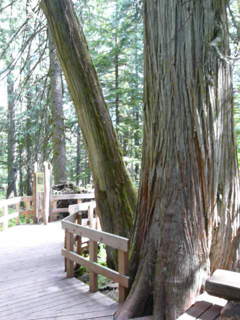 Giant Cedar Trail im Mount-Revelstoke-Nationalpark